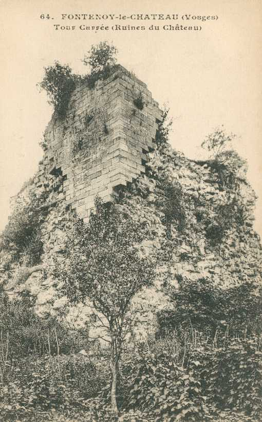 Donjon de Fontenoy-le-Château vers 1900, carte postale